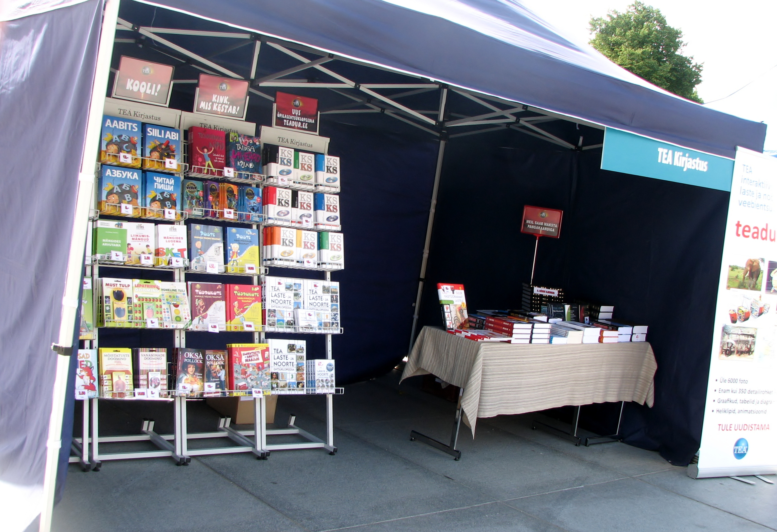 TEA Kirjastuse telk aabitsapeol Tallinnas Vabaduse väljakul